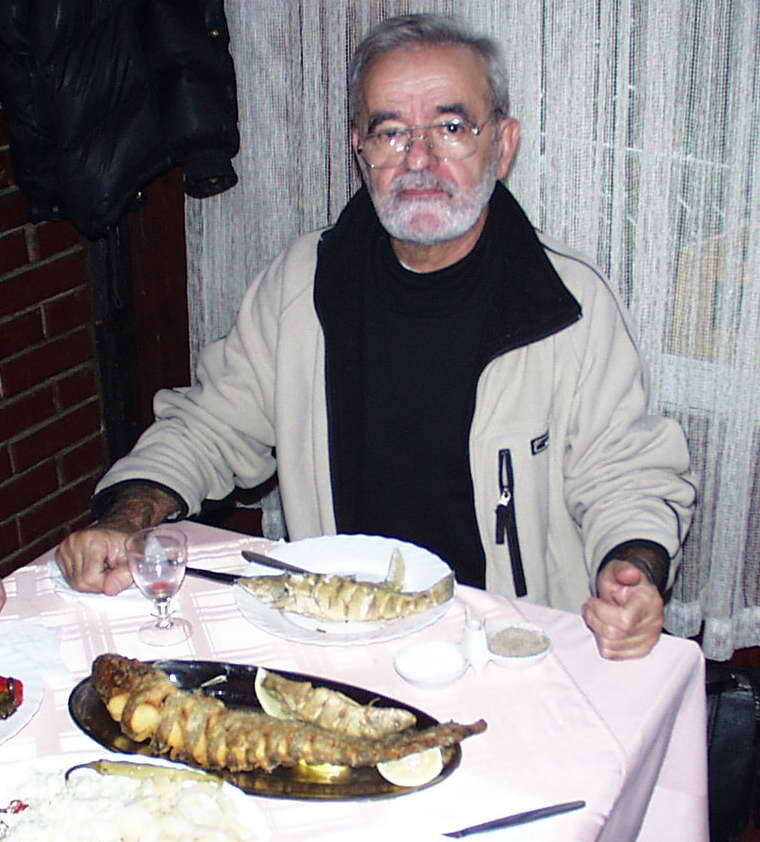 Sava Babić szerb író, költő, műfordító, egyetemi tanár